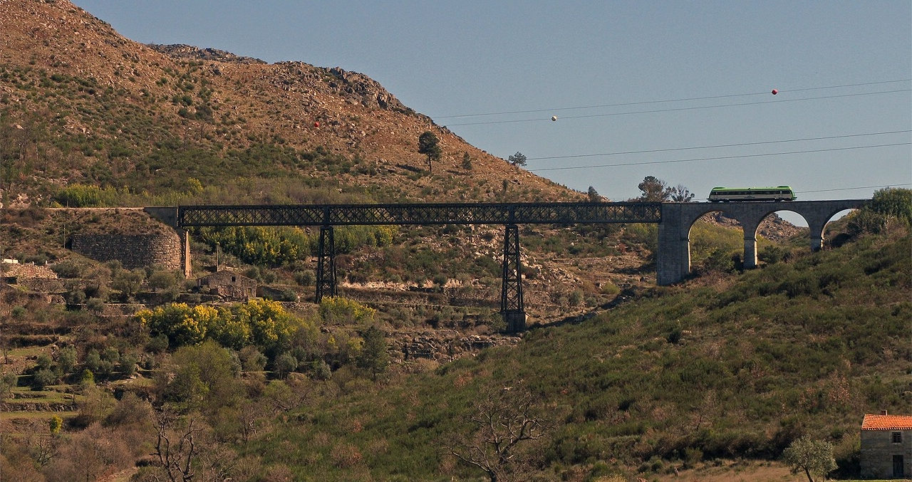 Automotora CP Allan 0350 a fazer um dos últimos serviços regionais antes do encerramento do troço Covilhã - Guarda para obras em Março de 2009. Ponte da Carvalha / Gogos, Benespera, Linha da Beira Baixa.